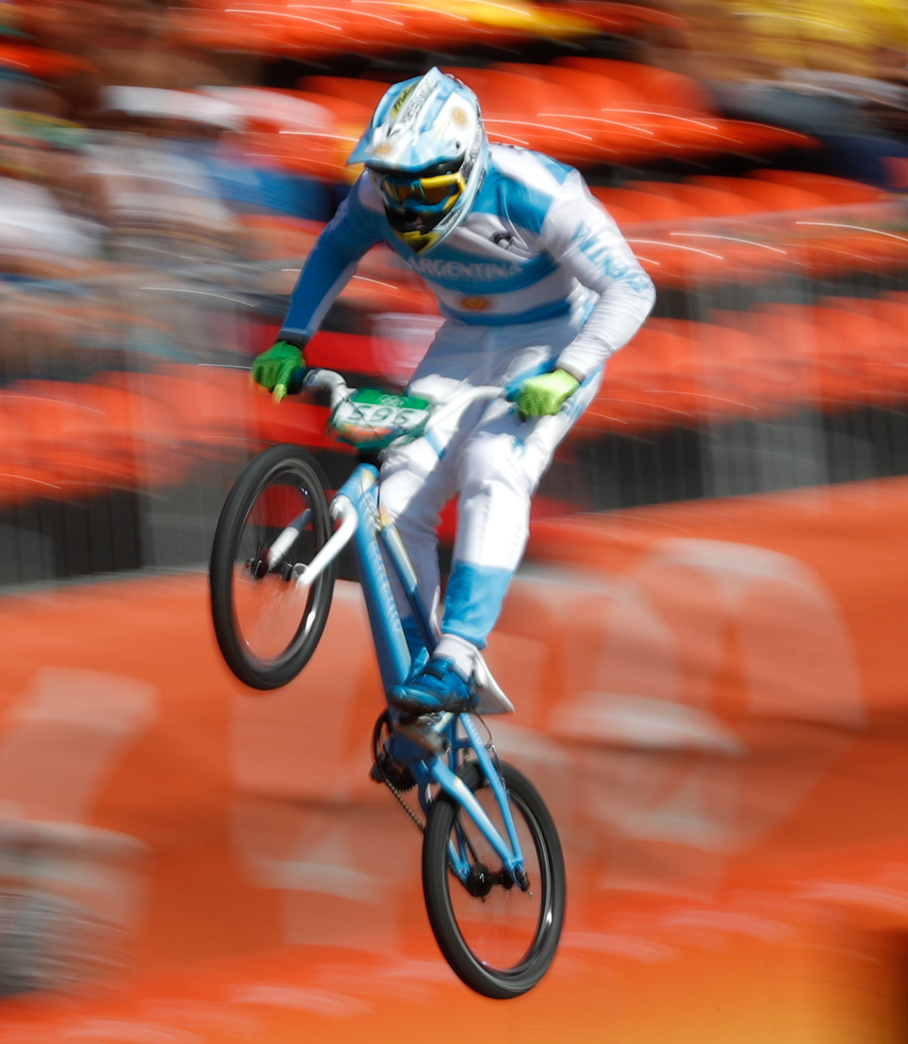 Rio de Janeiro - Ciclista argentino Gonzalo Molina compete BMX nos Jogos Olímpicos Rio 2016, no Parque Radical em Deodoro (Fernando Frazão/Agência Brasil)